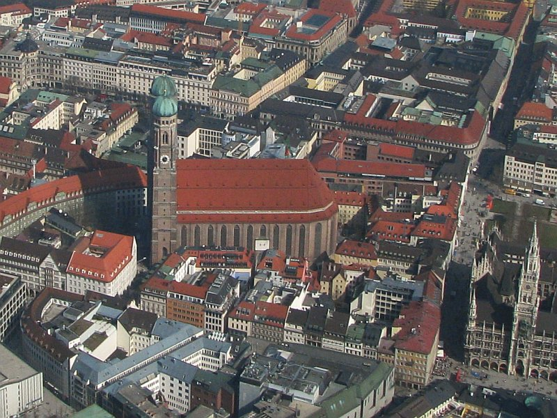 Luftbild München, Dom zu Unserer Lieben Frau/Frauenkirche/Liebfrauendom